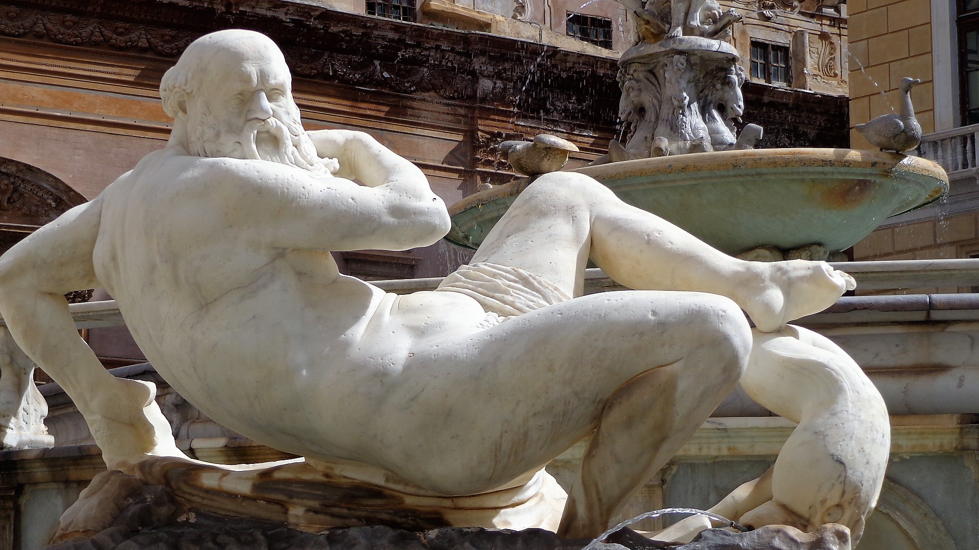 Statua divinità Fontana Pretoria Palermo